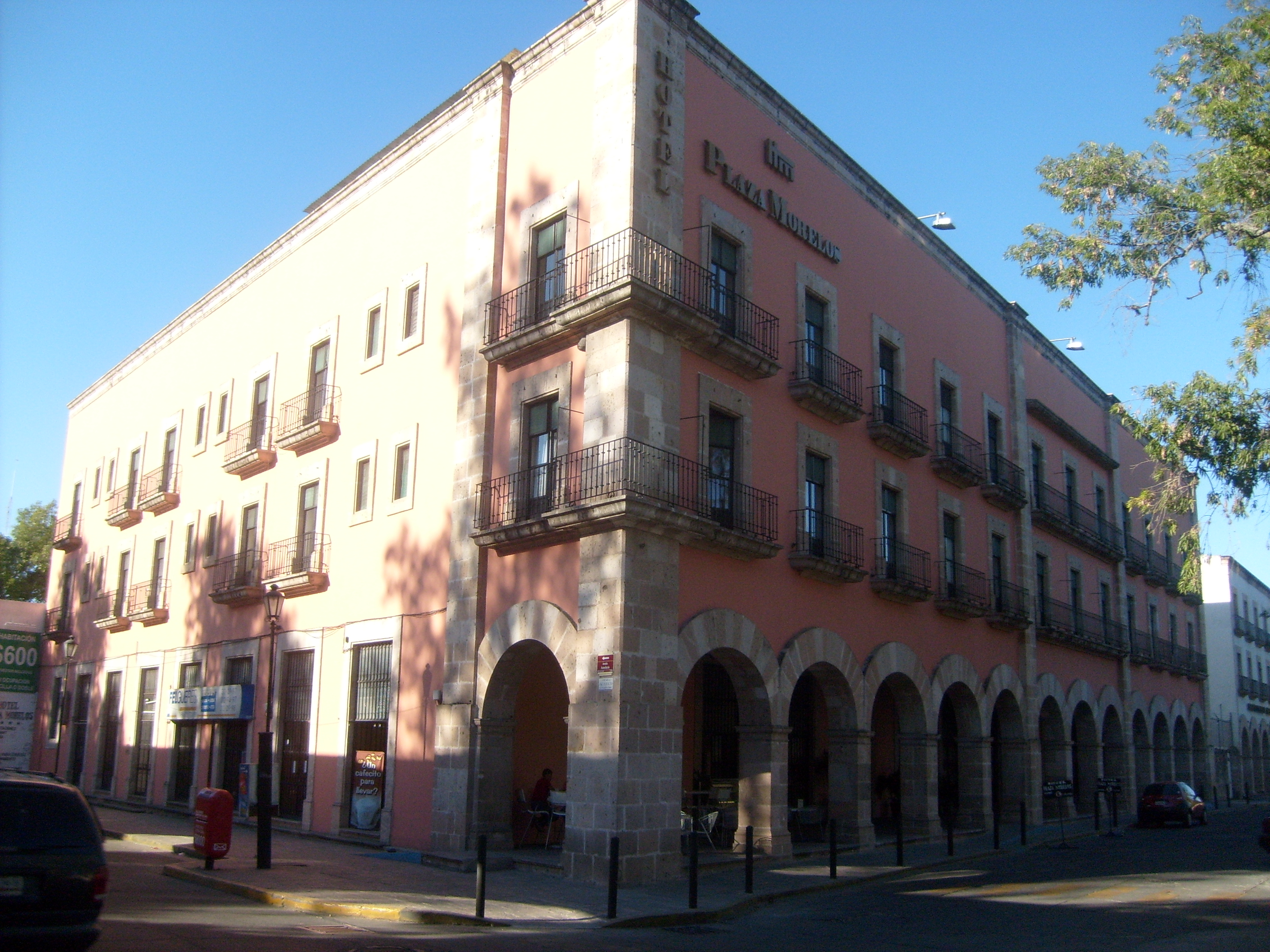 de estilo barroco son todos los edificios civiles y religuiosos de morelia